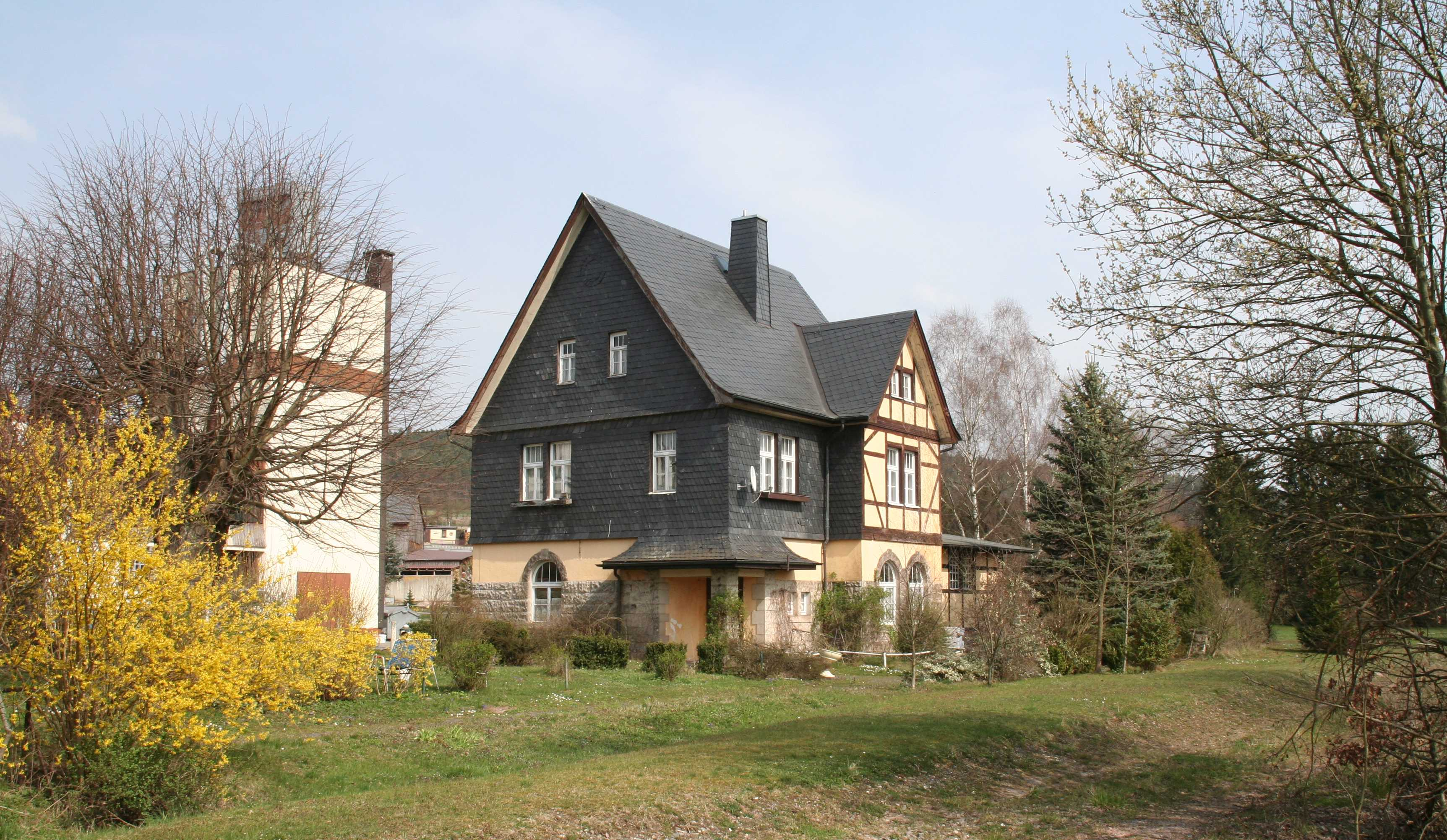 Bahnhof Mödlitz, Gemeinde Schneckenlohe im Landkreis Kronach in Bayern